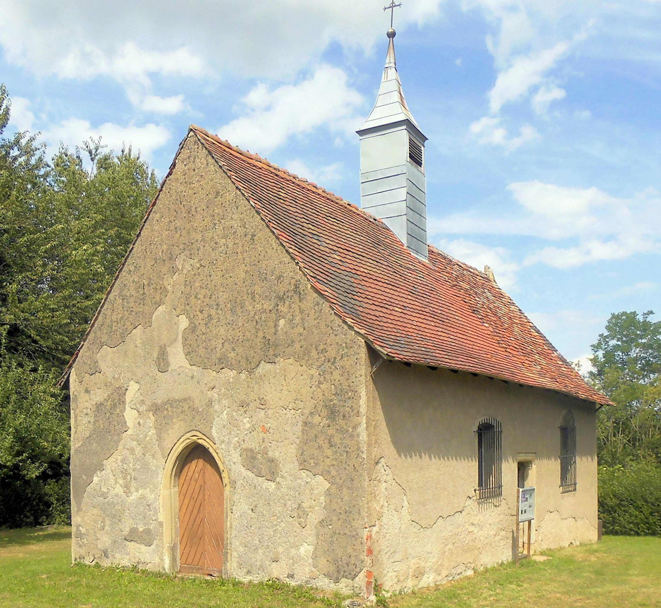 La chapelle Saint-Jean à Ueberstrass